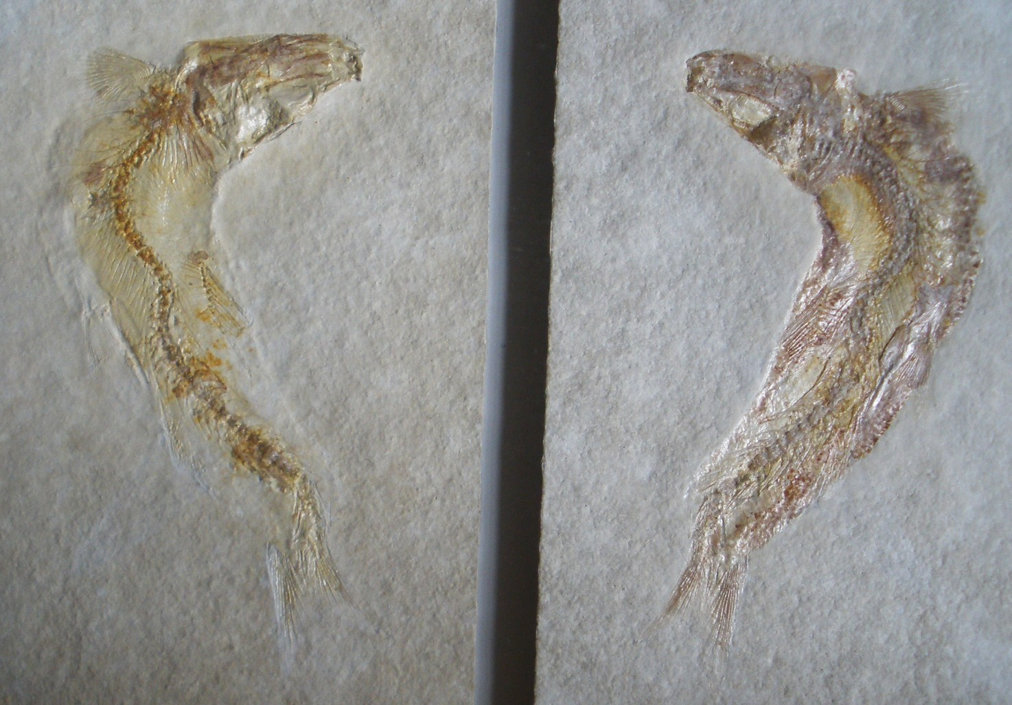 Fossil of Anaethalion, an extinct fish - Took the photo at Teylers Museum, Haarlem